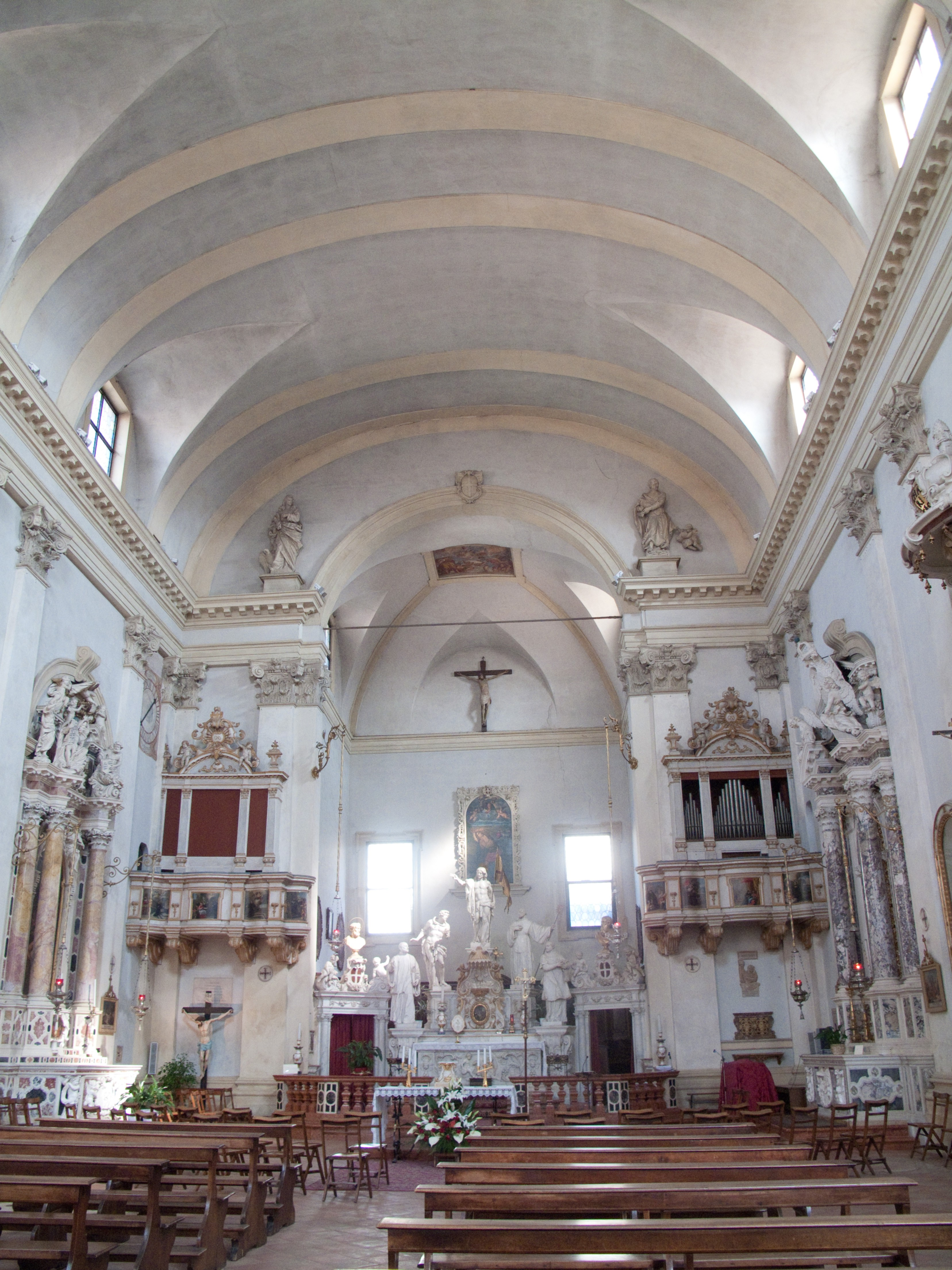 Vicenza - Chiesa di San Giuliano - Interno: navata.